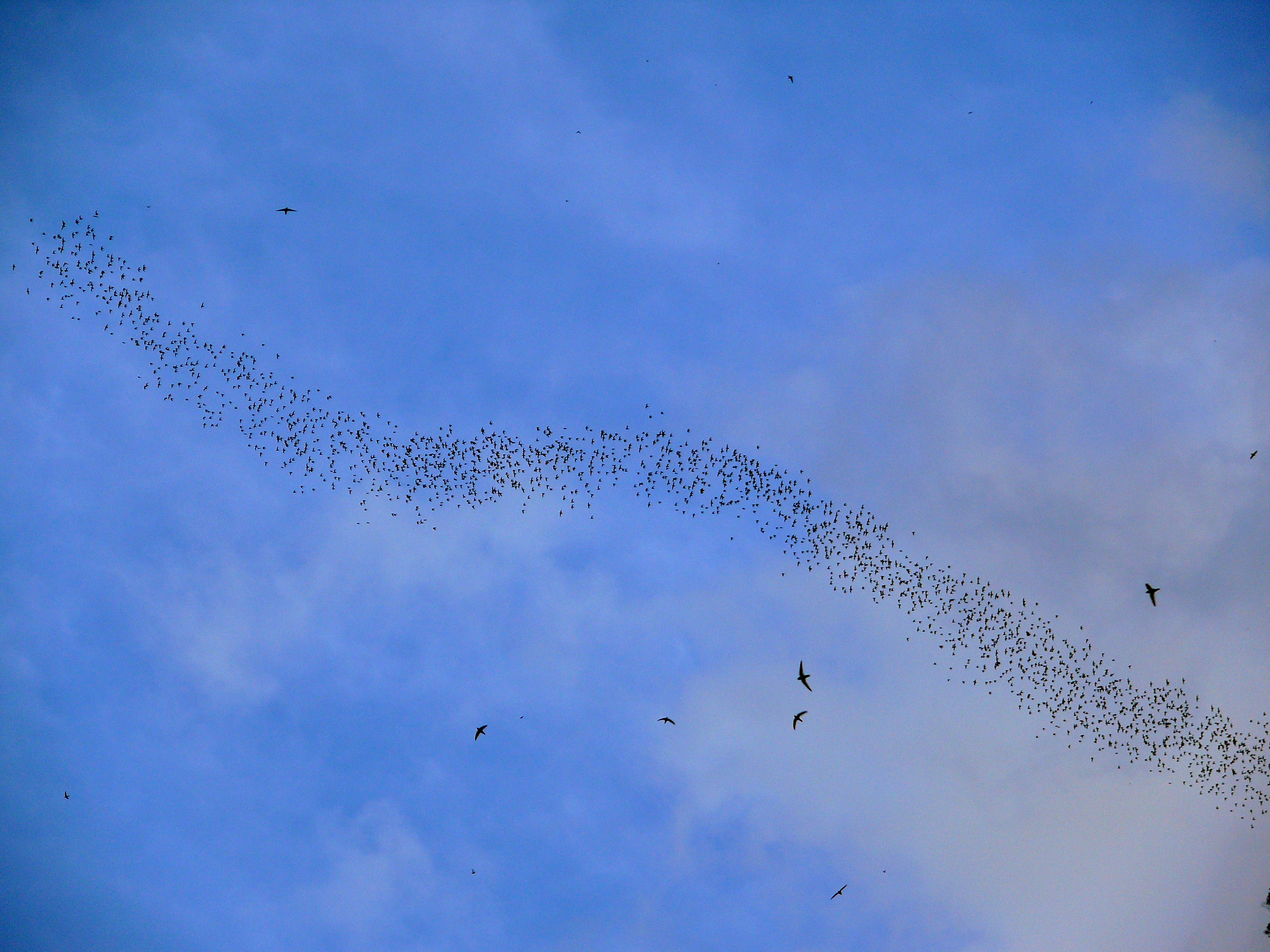 Gunung Mulu NP, Sarawak, MALAYSIA